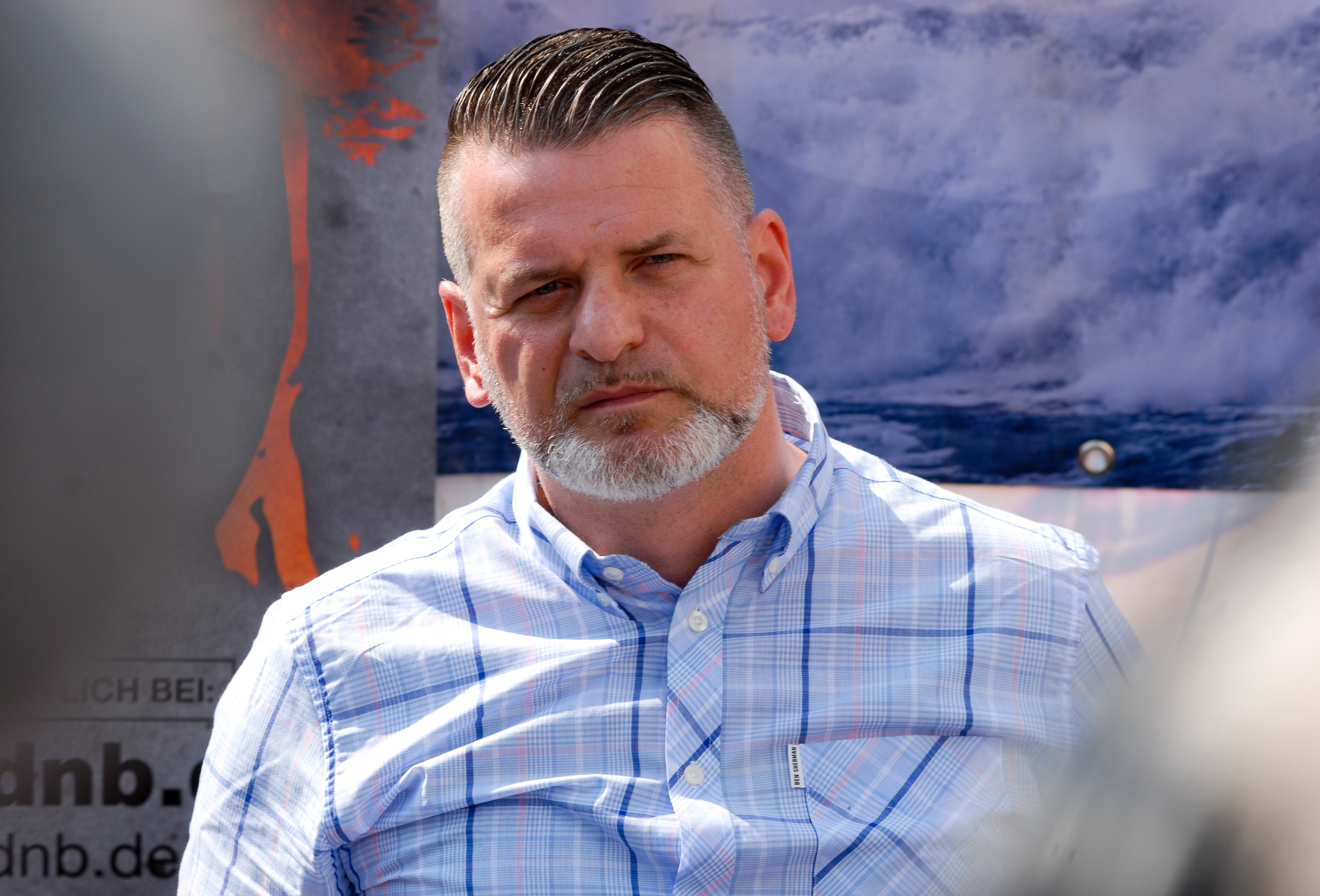 Thorsten Heise bei der Pressekonferenz zum "Schild und Schwert"-Festival in Ostritz am 21. April 2018